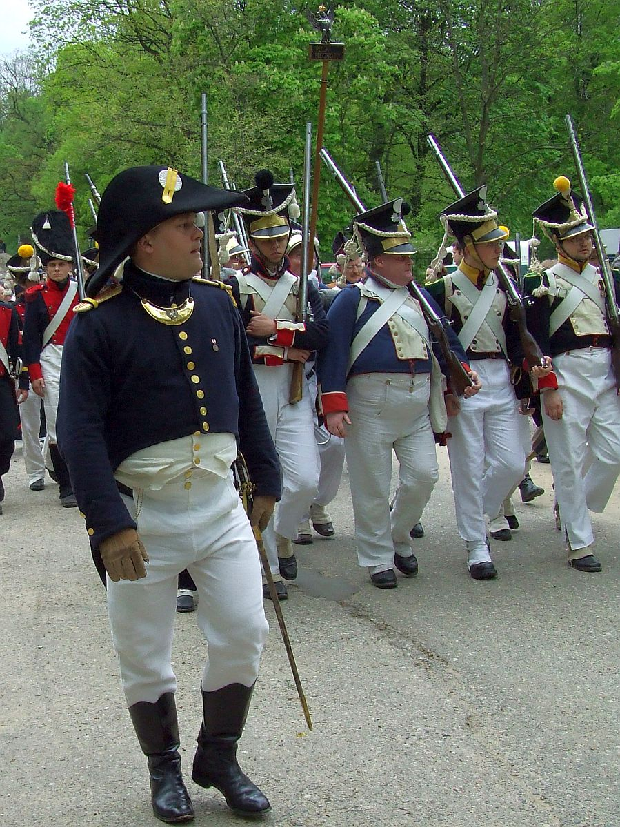 pl:2 Pułk Piechoty Księstwa Warszawskiego, rekonstrukcja